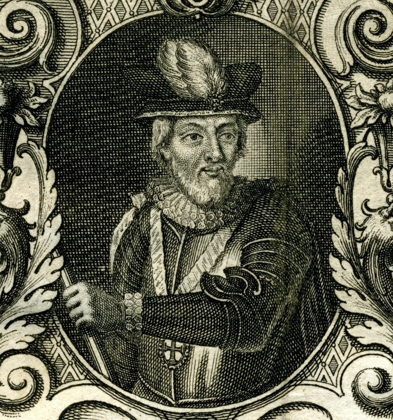 Portrait des Dom Luís de Ataíde, Vizekönig von Portugiesisch-Indien, 1736